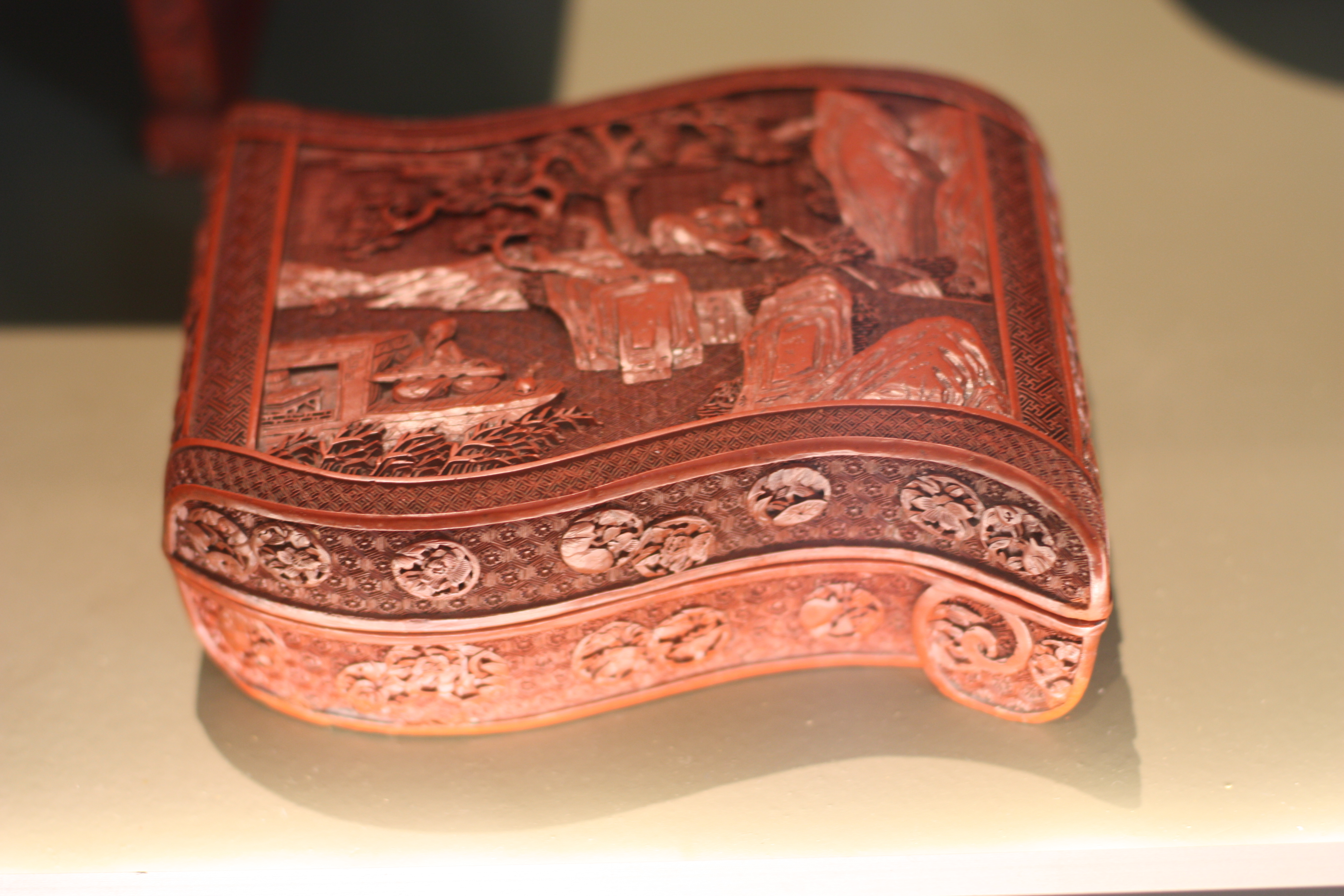 Lackkunst im Überseemuseum Bremen